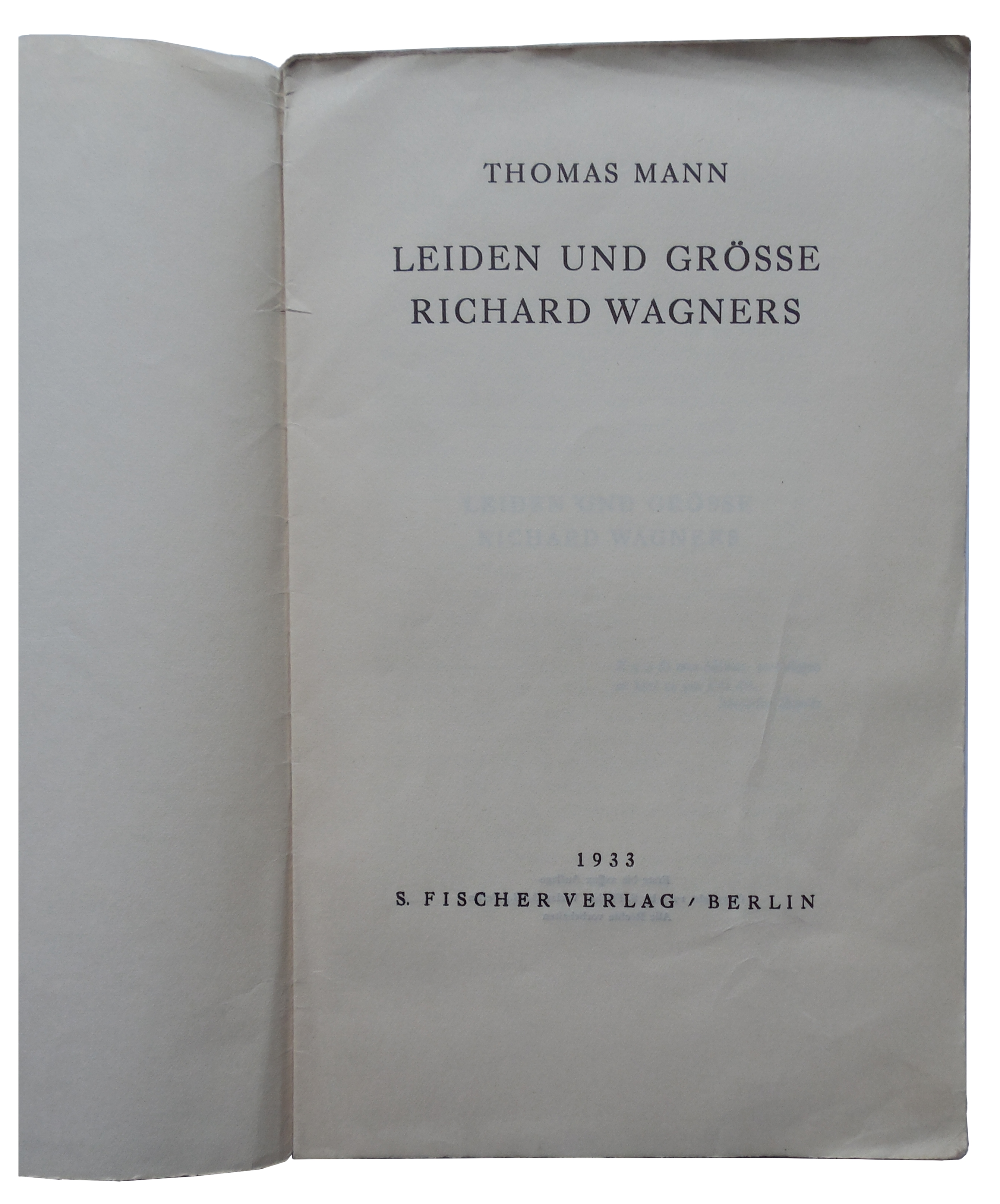 Wagner Druck Thomas Mann 1933 Titel